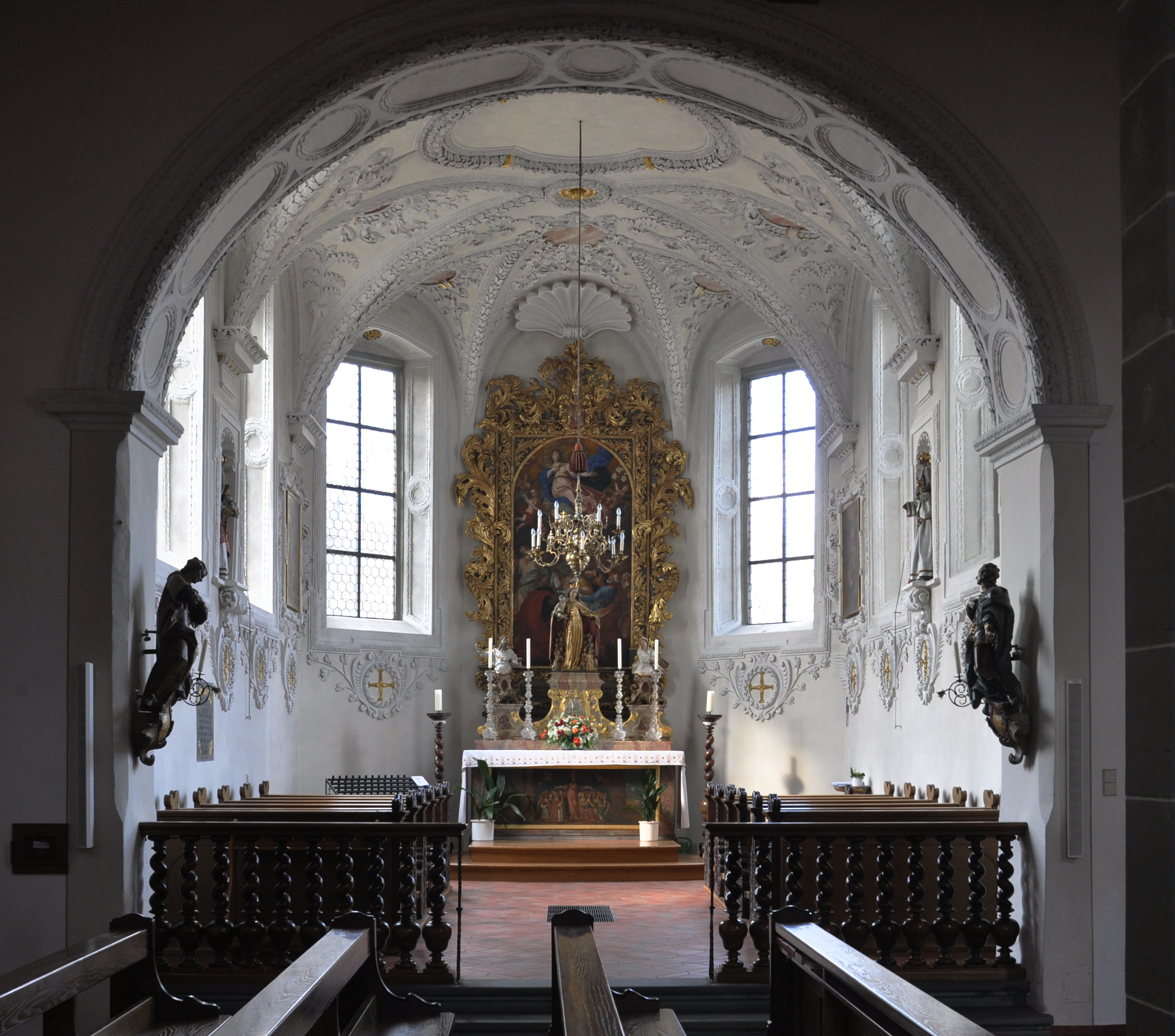 Kath. Pfarrkirche St. Nikolaus, Markdorf; Schutzmantelkapelle, Stuck wohl von Johann Schmuzer und Joseph Schmuzer, 1700